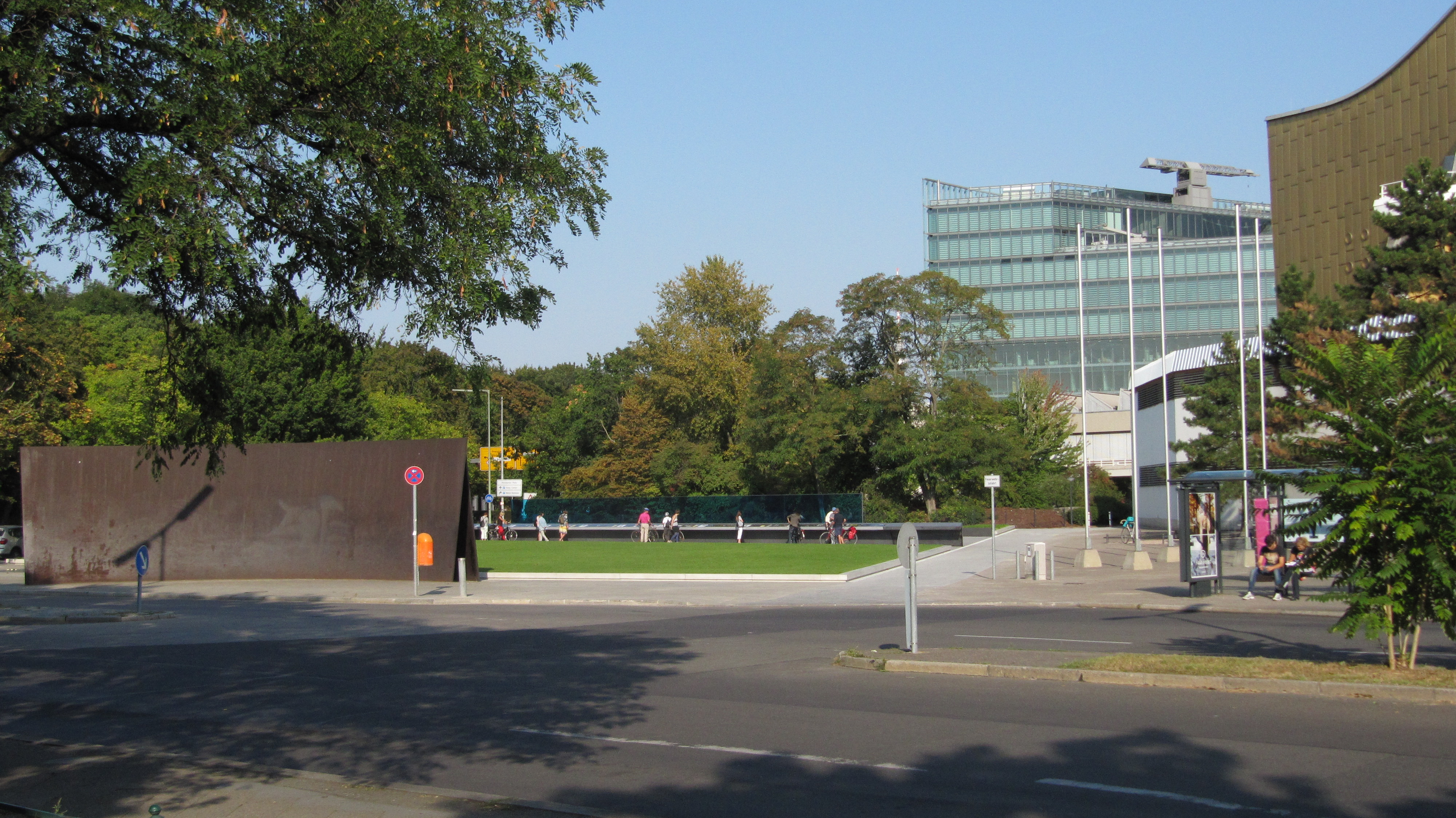 Gedenk- und Informationsort für die Opfer der nationalsozialistischen „Euthanasie“-Morde, altes und neues Denkmal